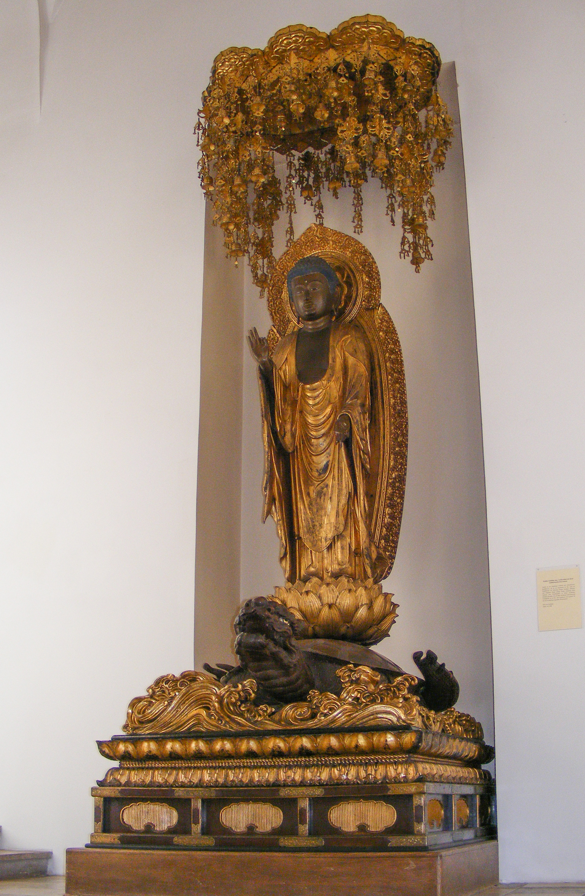 Buddha Amitabha auf einem Schildkrötendrachen, entstanden um 1800, Exponat im Staatlichen Museum für Völkerkunde München, Treppenhaus, Holz auf Goldlack, ca. 4 m hoch